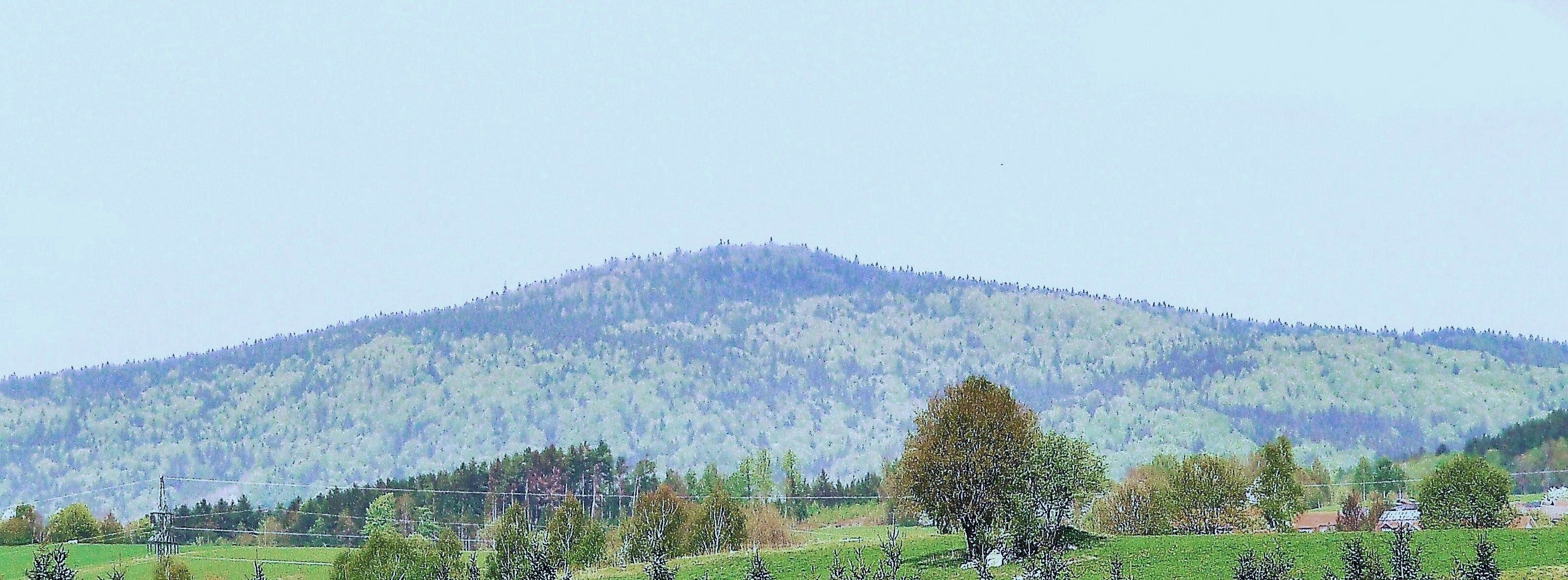 Blick zum Eschenberg im Bayerischen Wald von Südosten